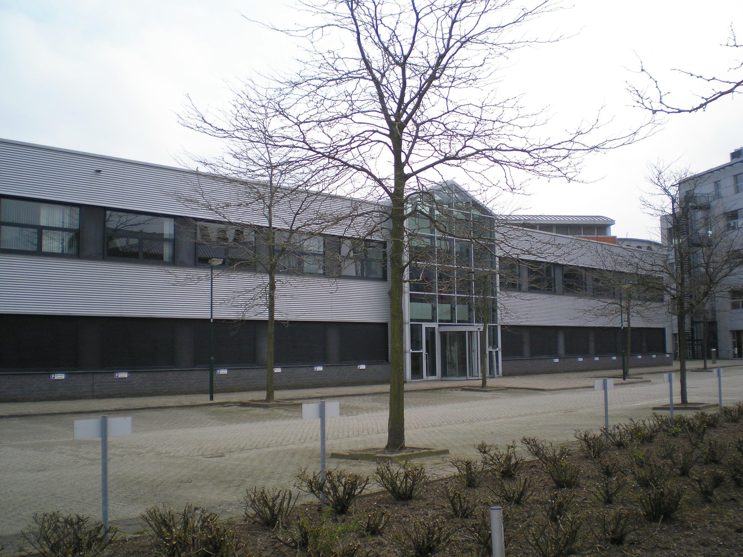 Voormalige hoofdkantoor Bruna B.V. aan de Walmolen 21-23 te Houten in Nederland